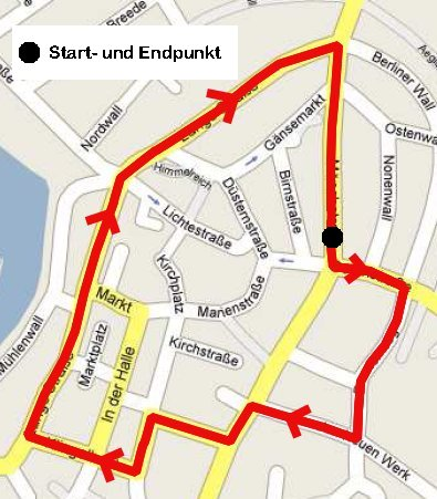 Karfreitagsprozession Wiedenbrueck: Route